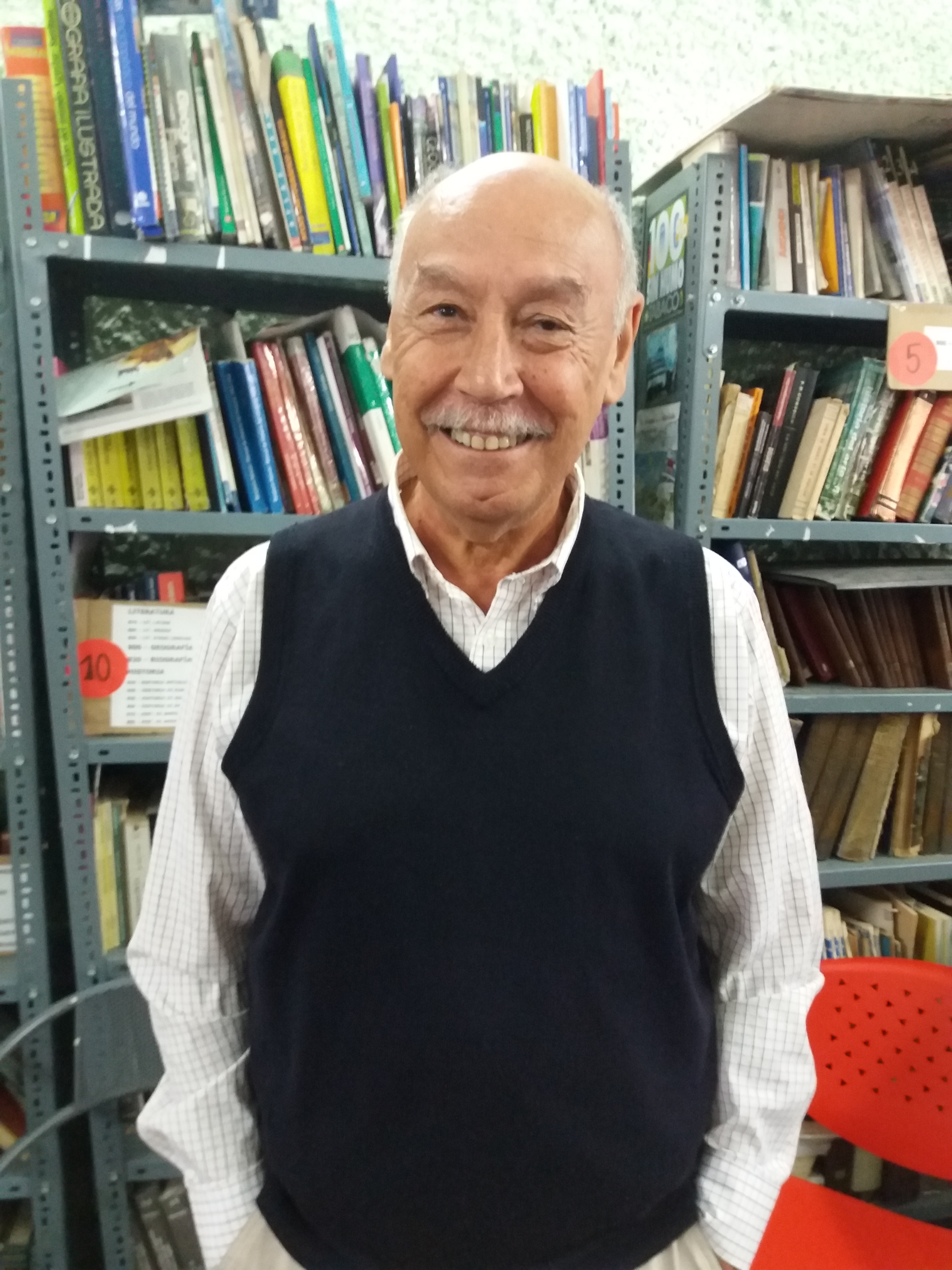 Dramaturgo uruguayo